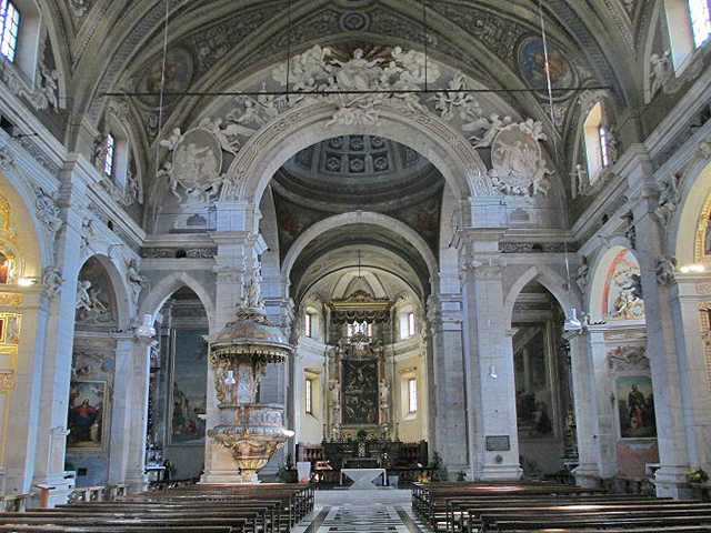 Collegiata Bellinzona, Innenansicht